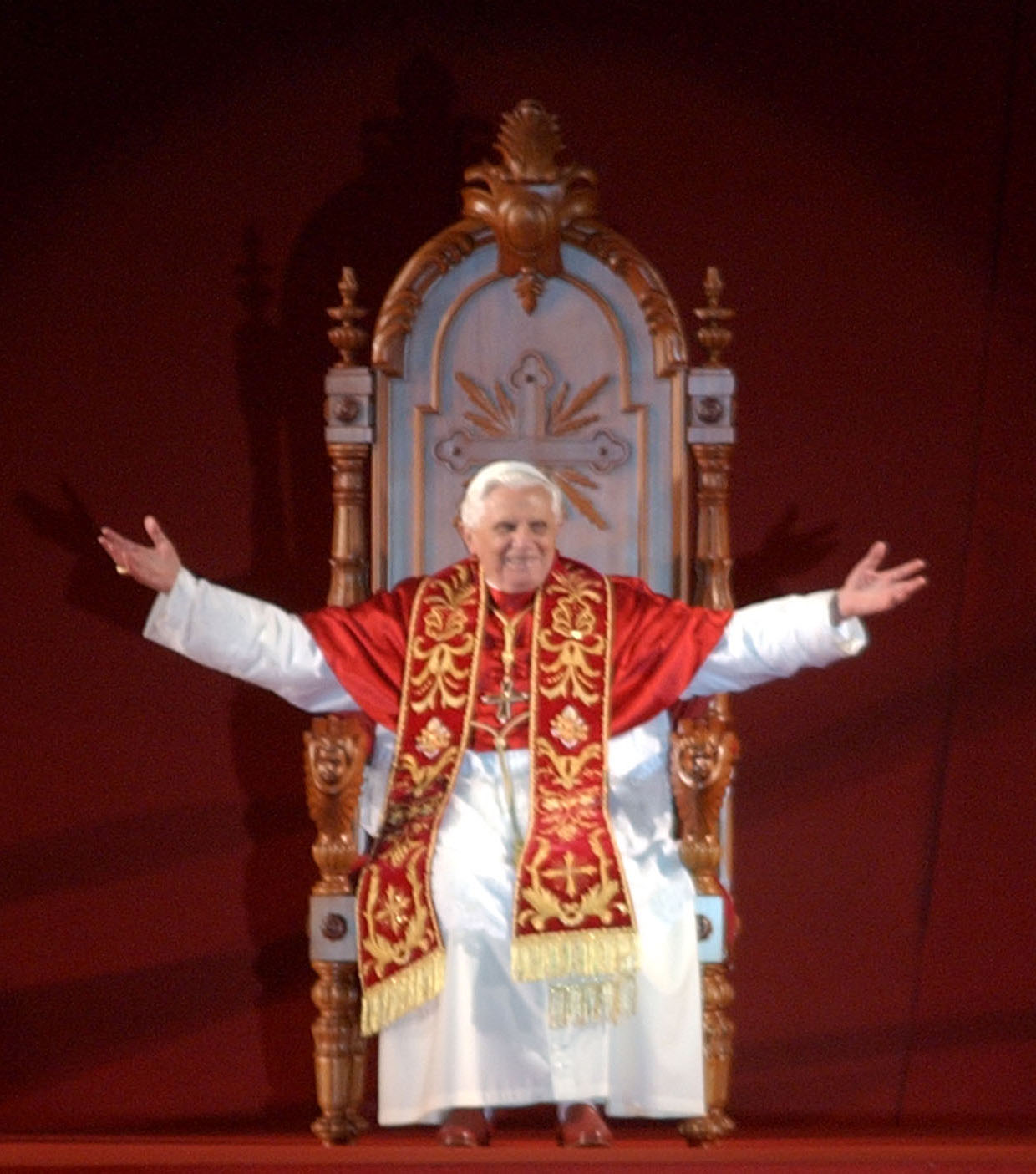 Bento XVI durante encontro com os jovens no Estádio do Pacaembu em São Paulo, Brasil.